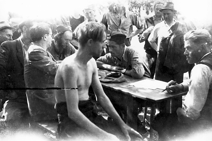 Српски (ћирилица): Лекарски преглед и регрутација: Група жичких бригада, околина Краљева. Седи у челу стола, капетан Љубиша Анђелковић.